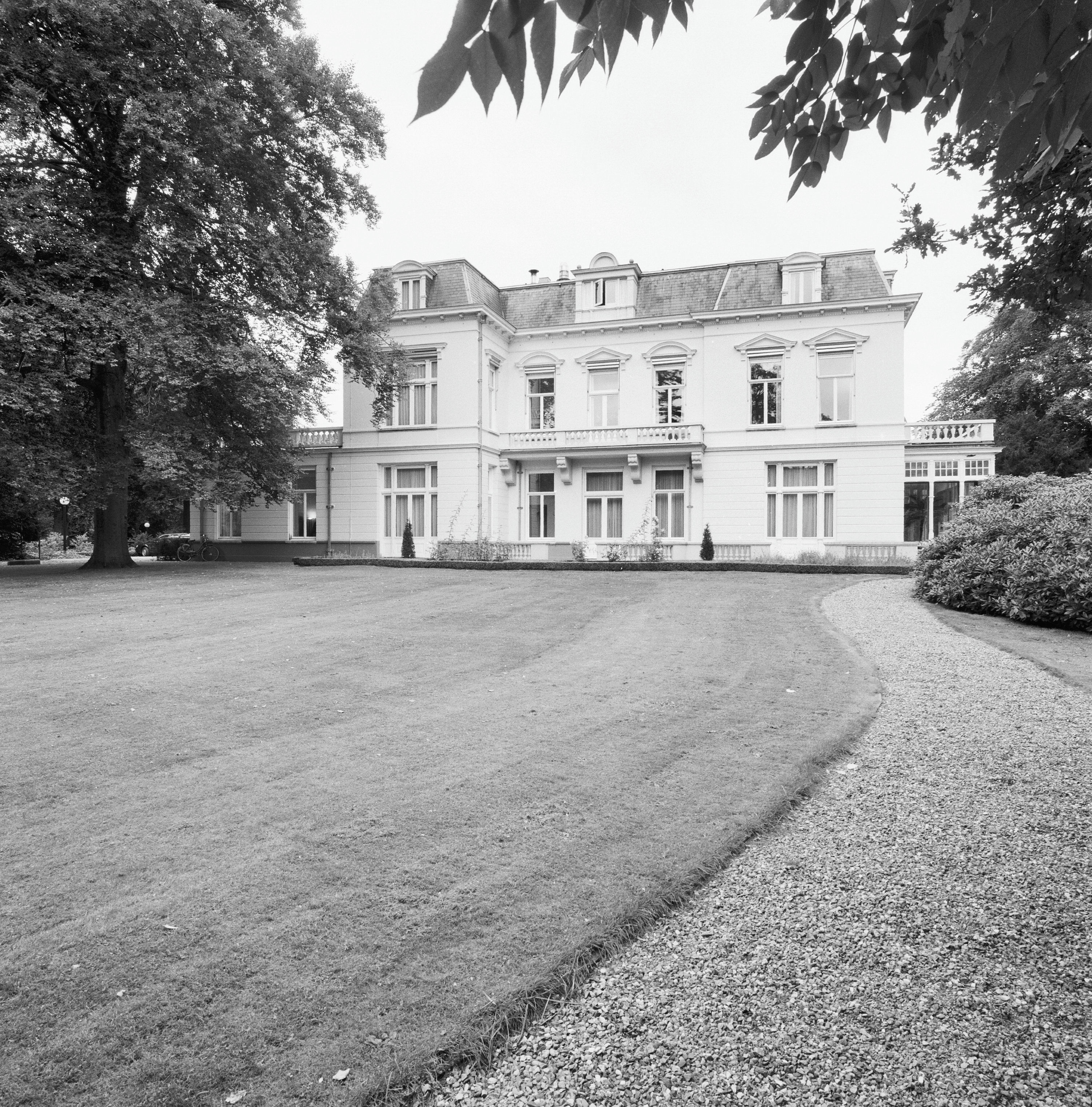 Villa Nuova: Achtergevel (opmerking: Gefotografeerd voor De Utrechtse Heuvelrug)